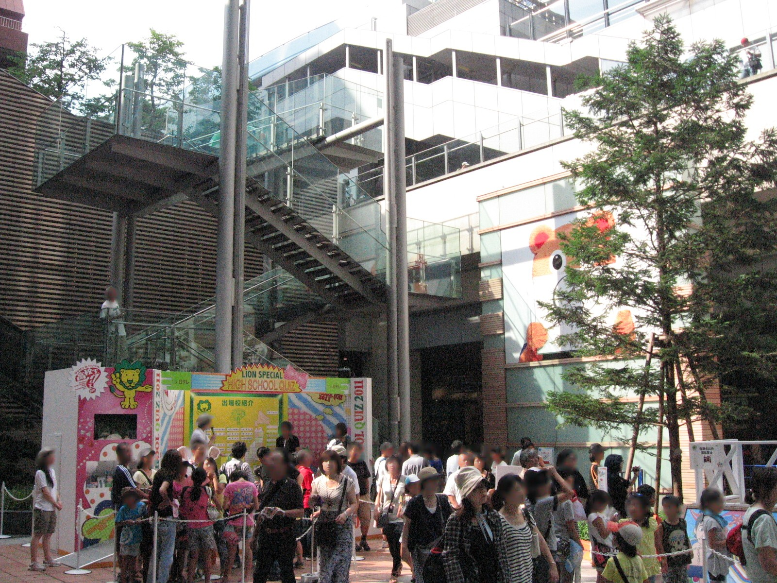 日本テレビの夏イベント『汐博2011』。 2011年8月15日に同会場で撮影したものをPhotostudio5.5を使って編集。